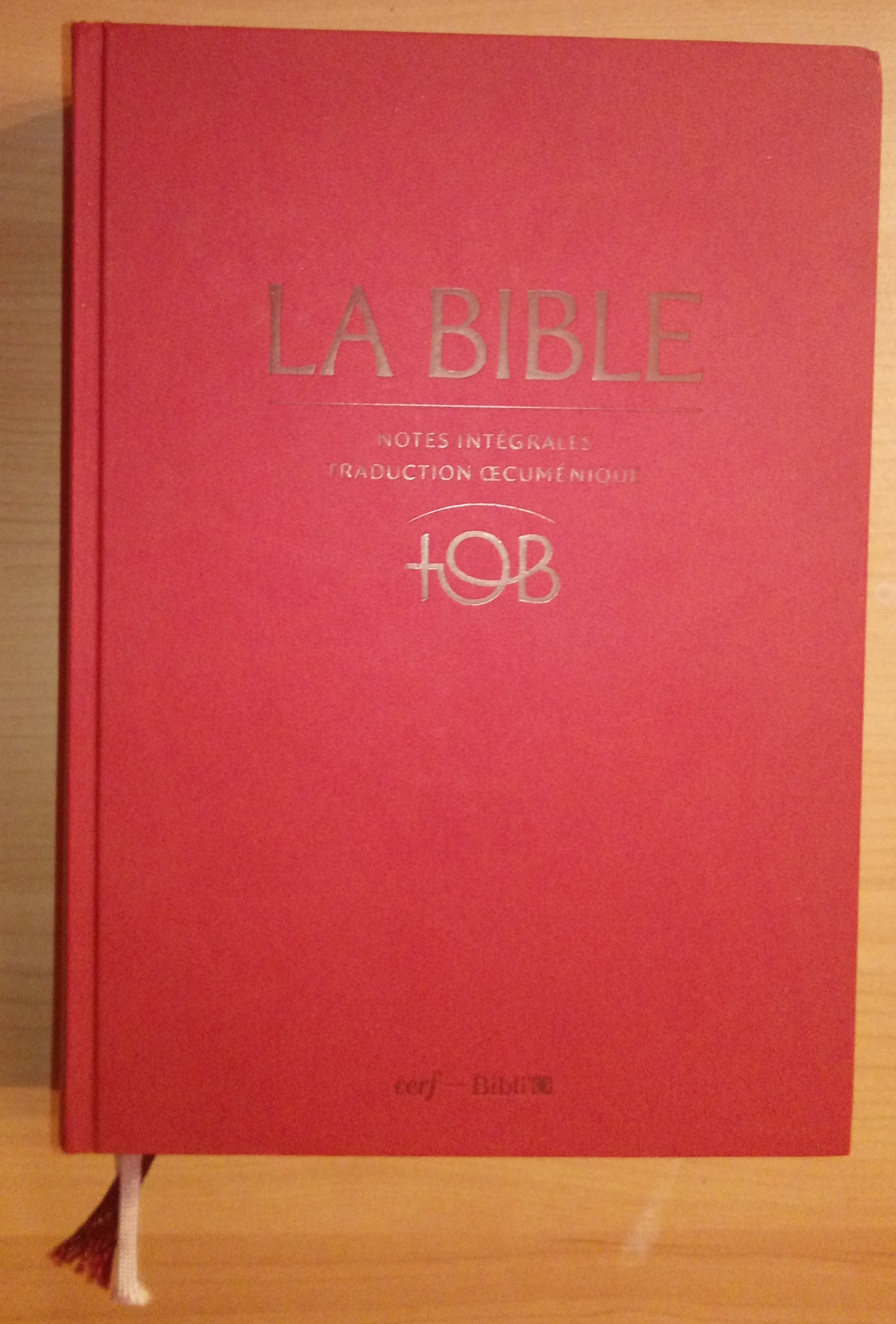 TOB notes intégrales (éd. 2012).